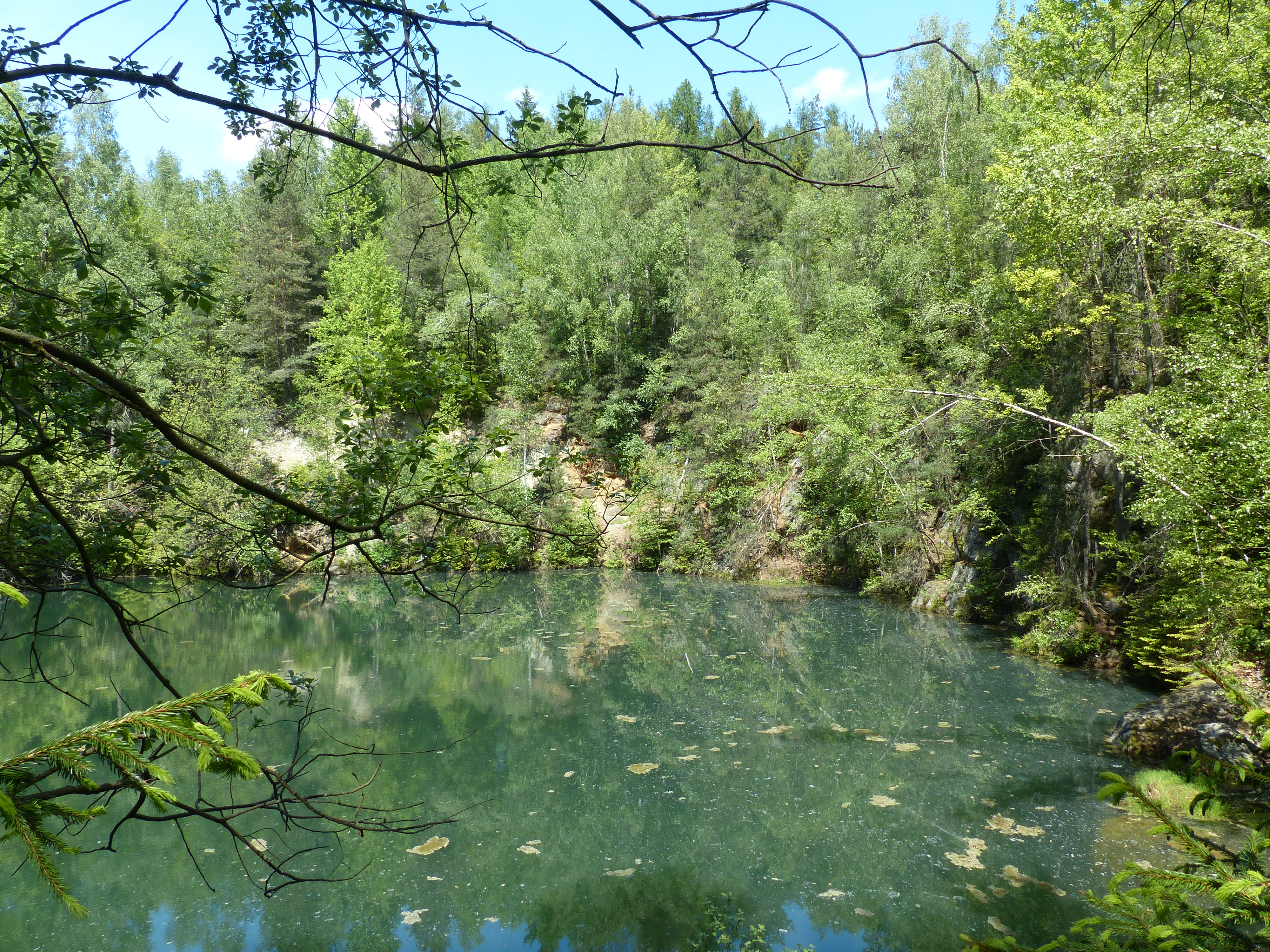 Kleinwendern